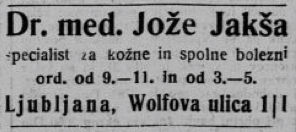 Časopisni oglas za dermatovenerološko ambulanto dr. Jožeta Jakše v časopisu JUTRO, Leto VIII, št. 202, nedelja 28. avgust 1927